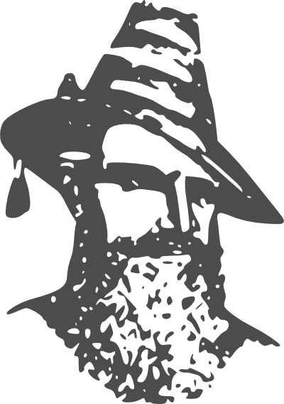 Stefano Pelloni, immagine creata da un vettoriale riprendendo le immagini delle stampe dell'epoca. Licenza GPL.